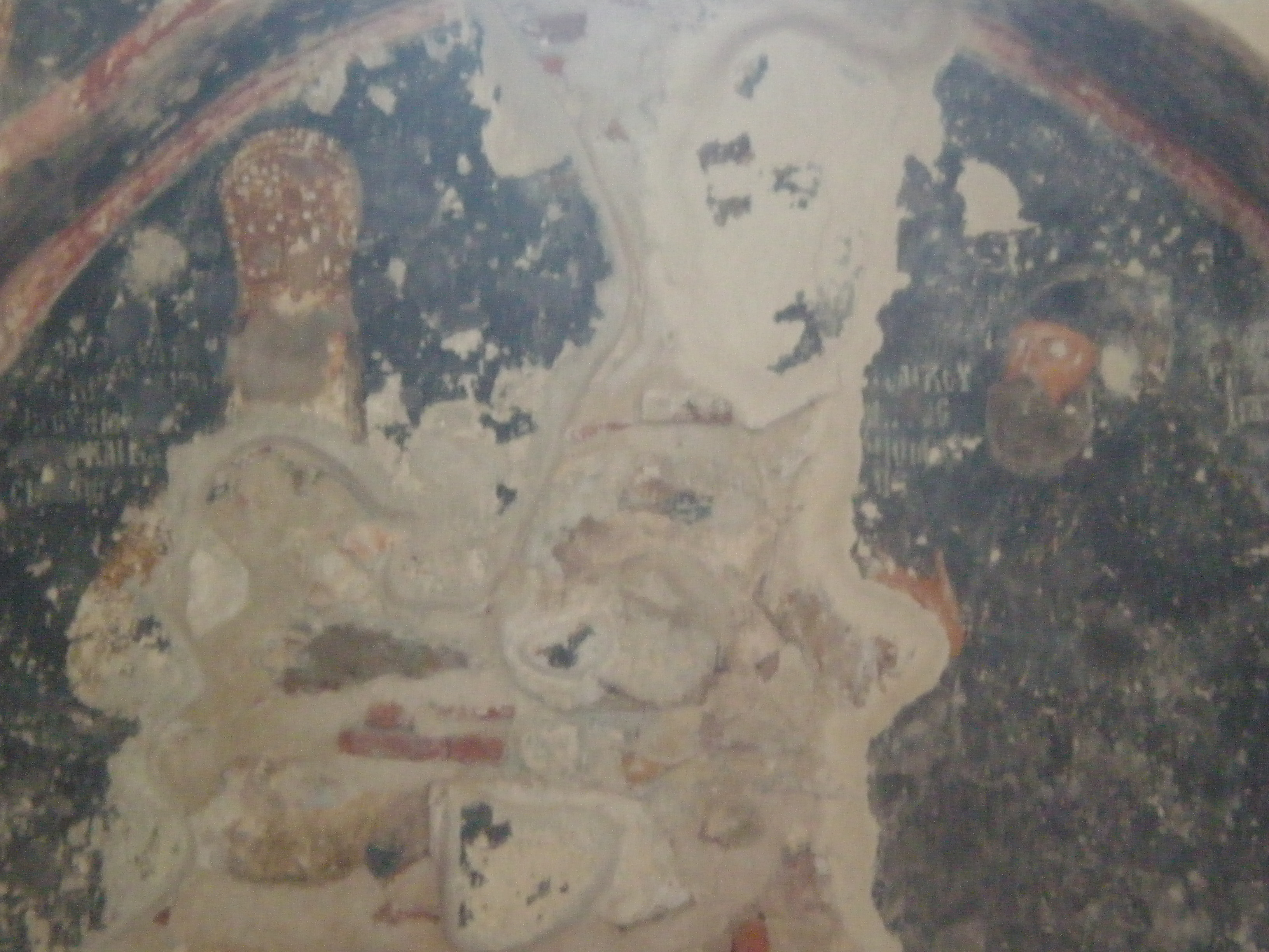 Τοιχογραφία από το ναό της Παναγίας Οδηγήτριας στο Μυστρά που αναπαριστά τον δεσπότη Θεόδωρο Α΄ Παλαιολόγο ως ηγεμόνα και μοναχό